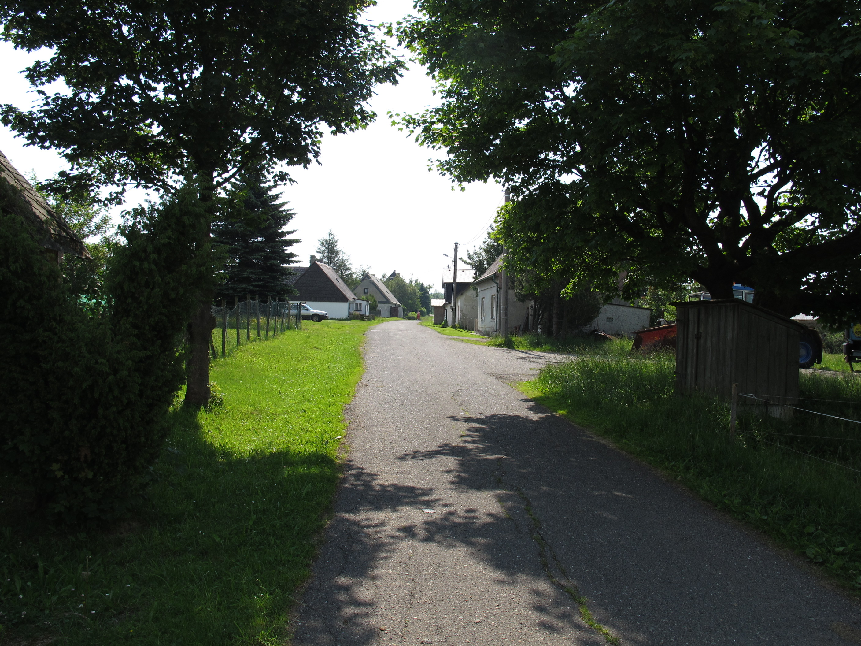 Rudolice v Horách (osada Hory Svaté Kateřiny)